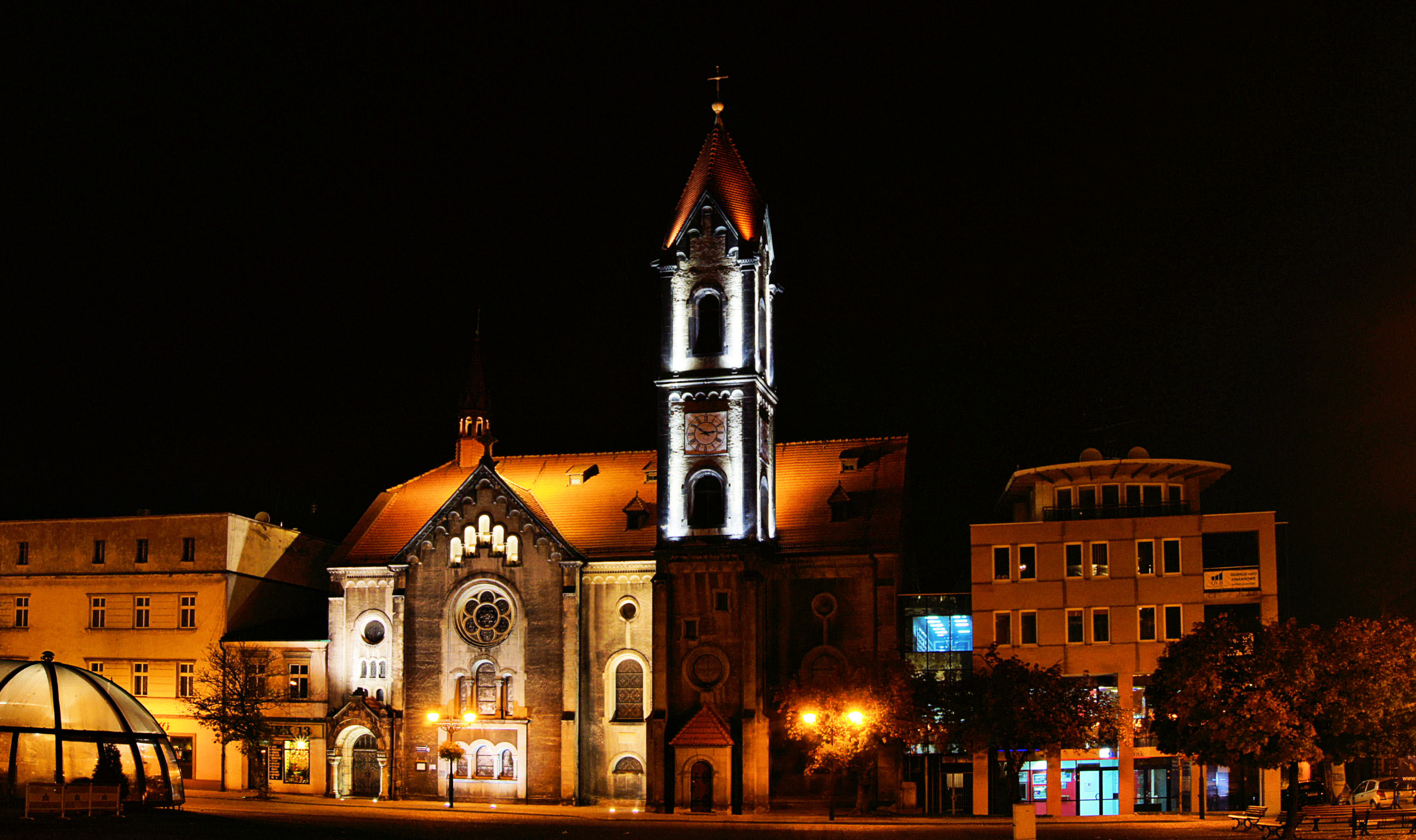 Tarnowskie Góry - Kościół Ewangelicki